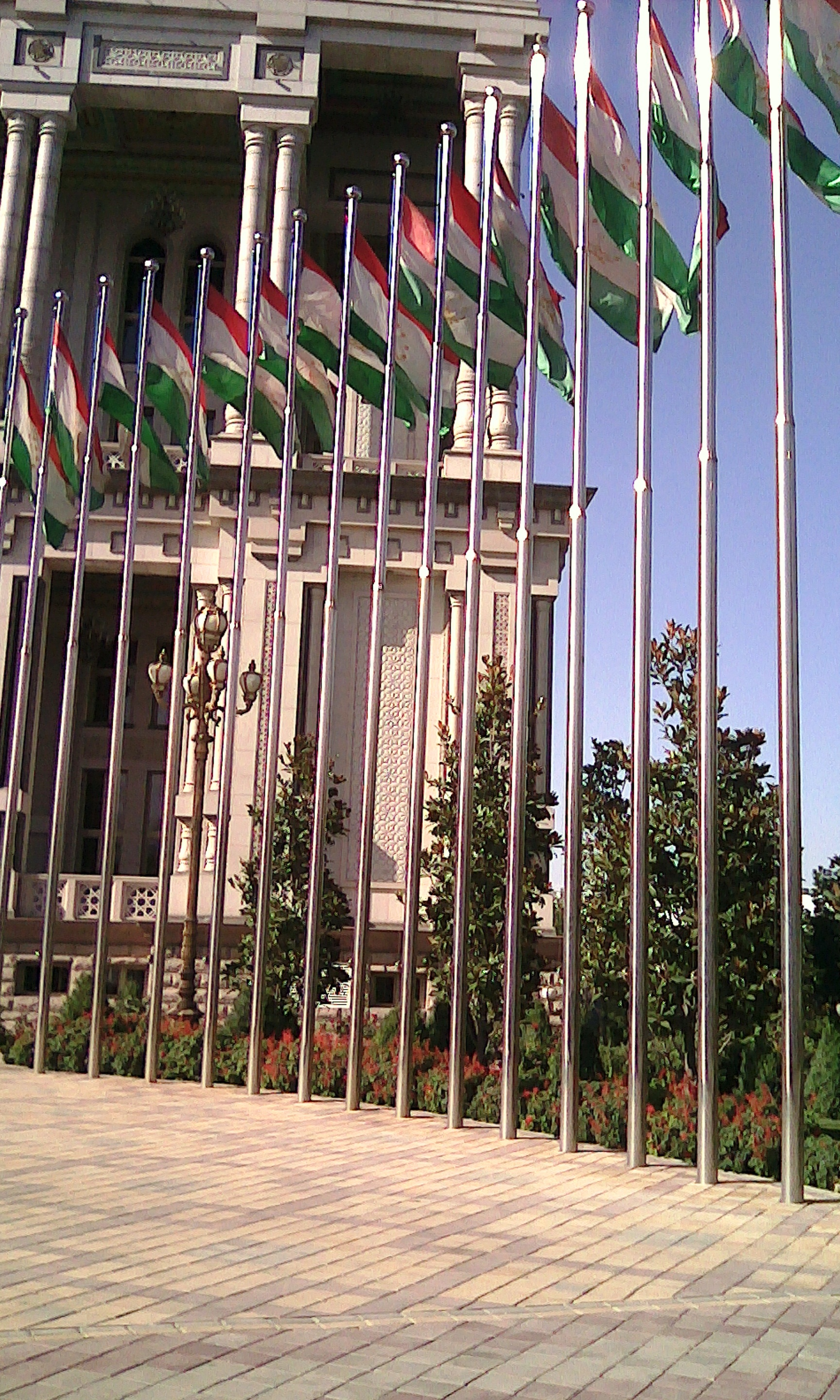 Флаги Таджикистана на проспекте Сомони, г. ДушанбеТоҷикӣ: Парчамҳои Тоҷикистон дар хиёбони Сомонӣ, ш. Душанбе